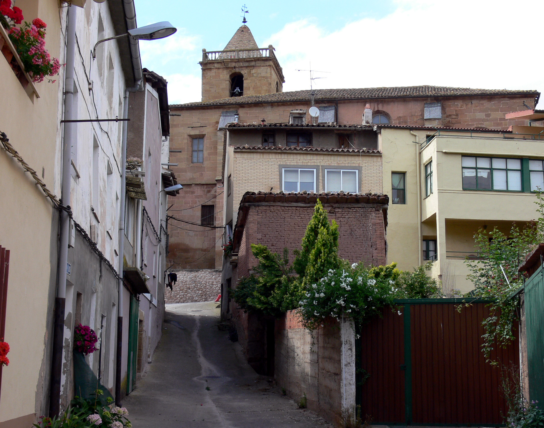 Uruñuela, municipio de La Rioja (España)